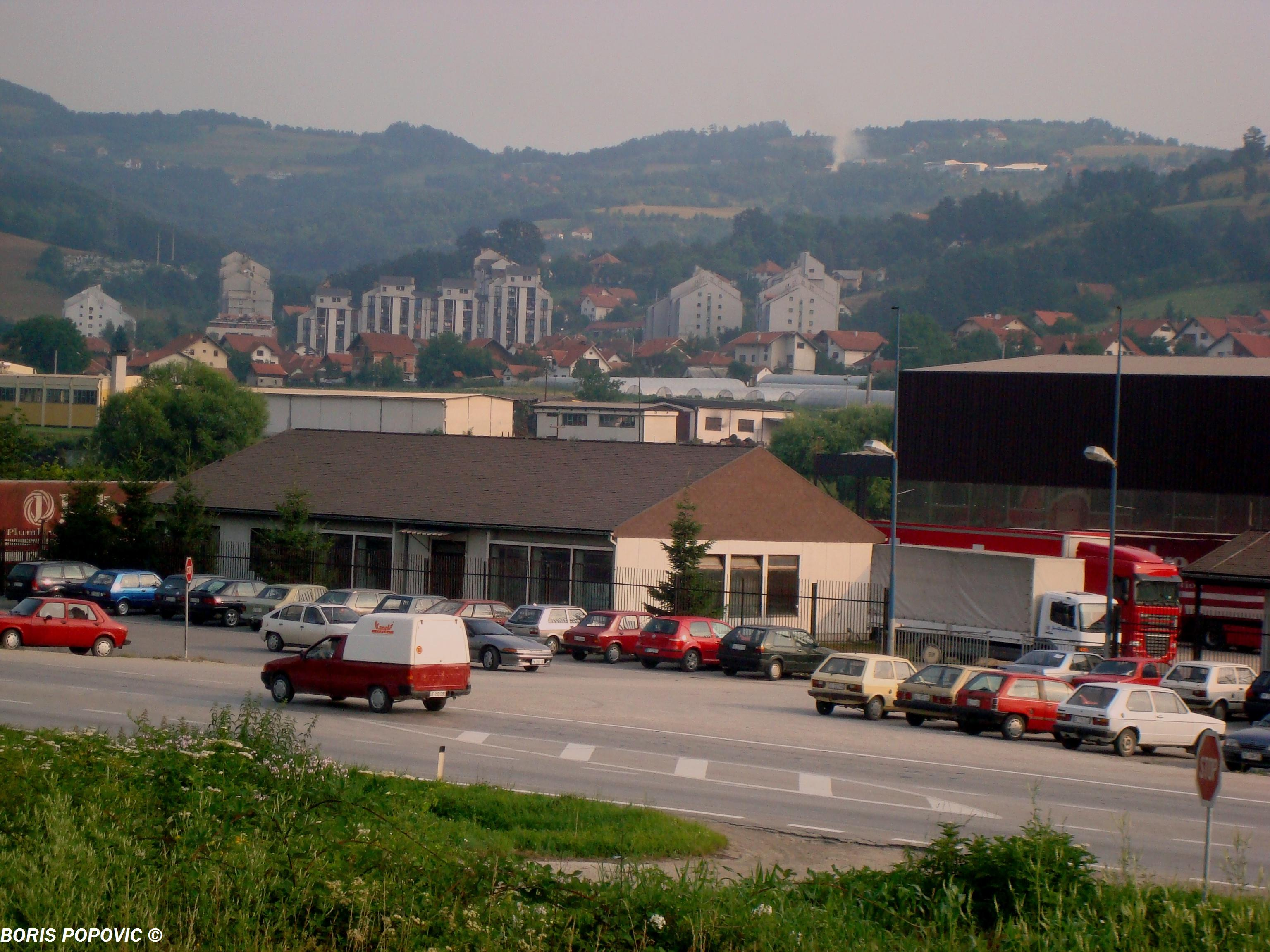 Sevojno